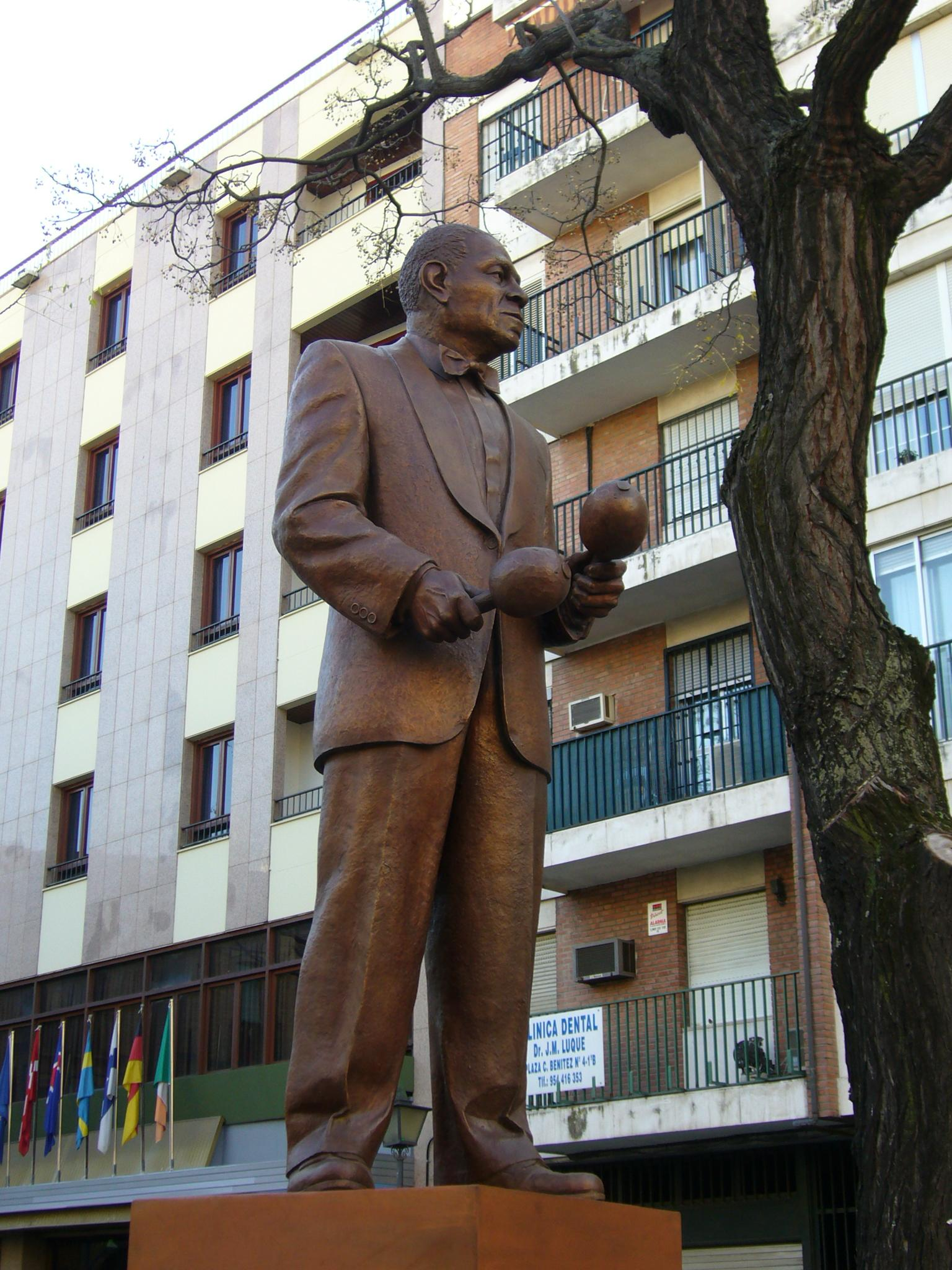 Escultura homenaje a Antonio Machín en Sevilla